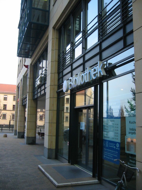 Ehemaliger Eingang Hauptbibliothek der Städtischen Bibliotheken Dresden im Dresdner World Trade Center, Freiberger Straße Seit lange geht es vorne rein.